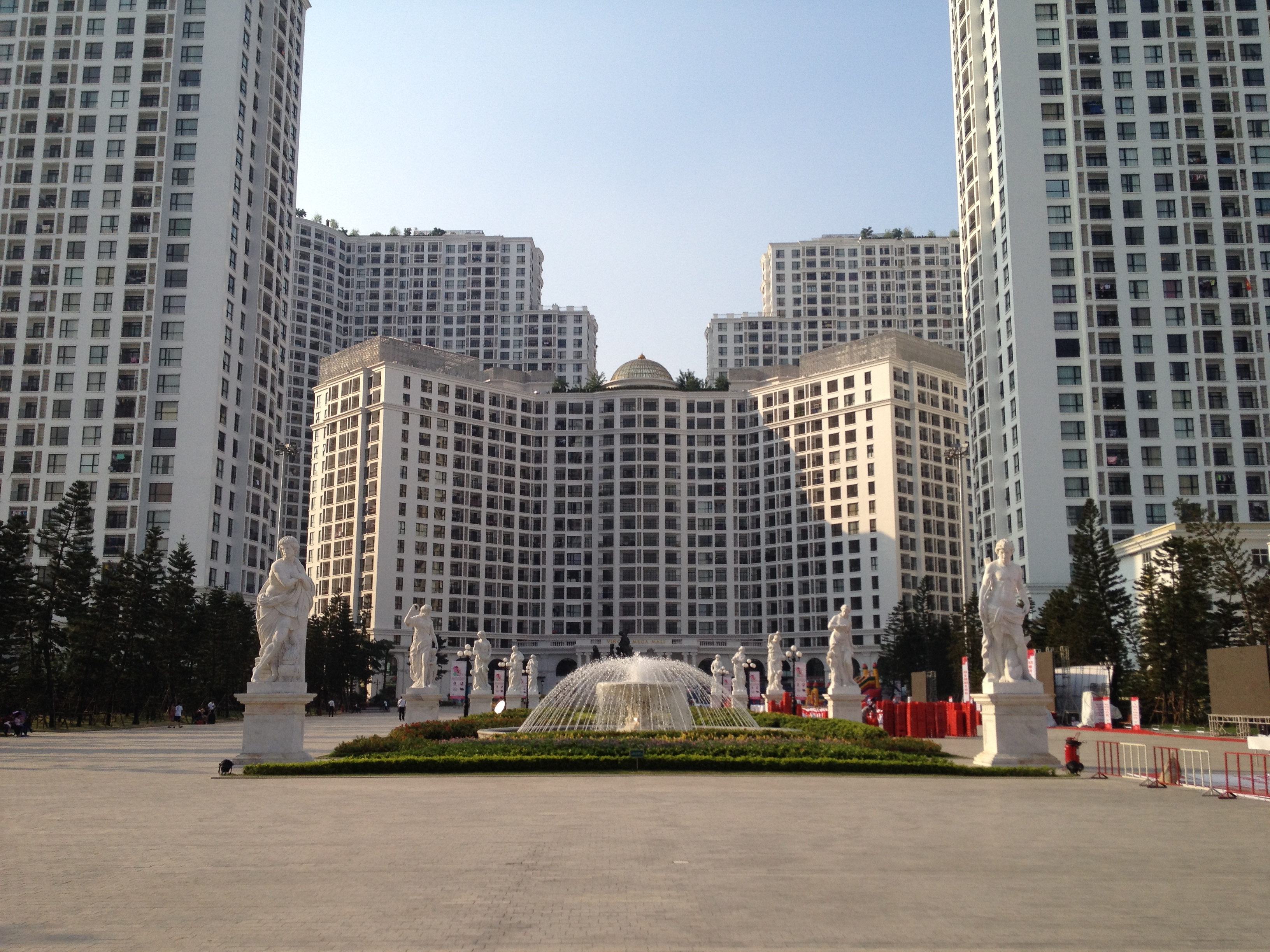 Royal City, Hà Nội, Việt Nam.